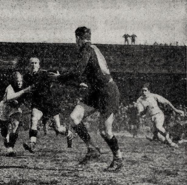 1947, finale du championat de France de rugby, l'arrière toulousain Mellet passe à Dutrain.